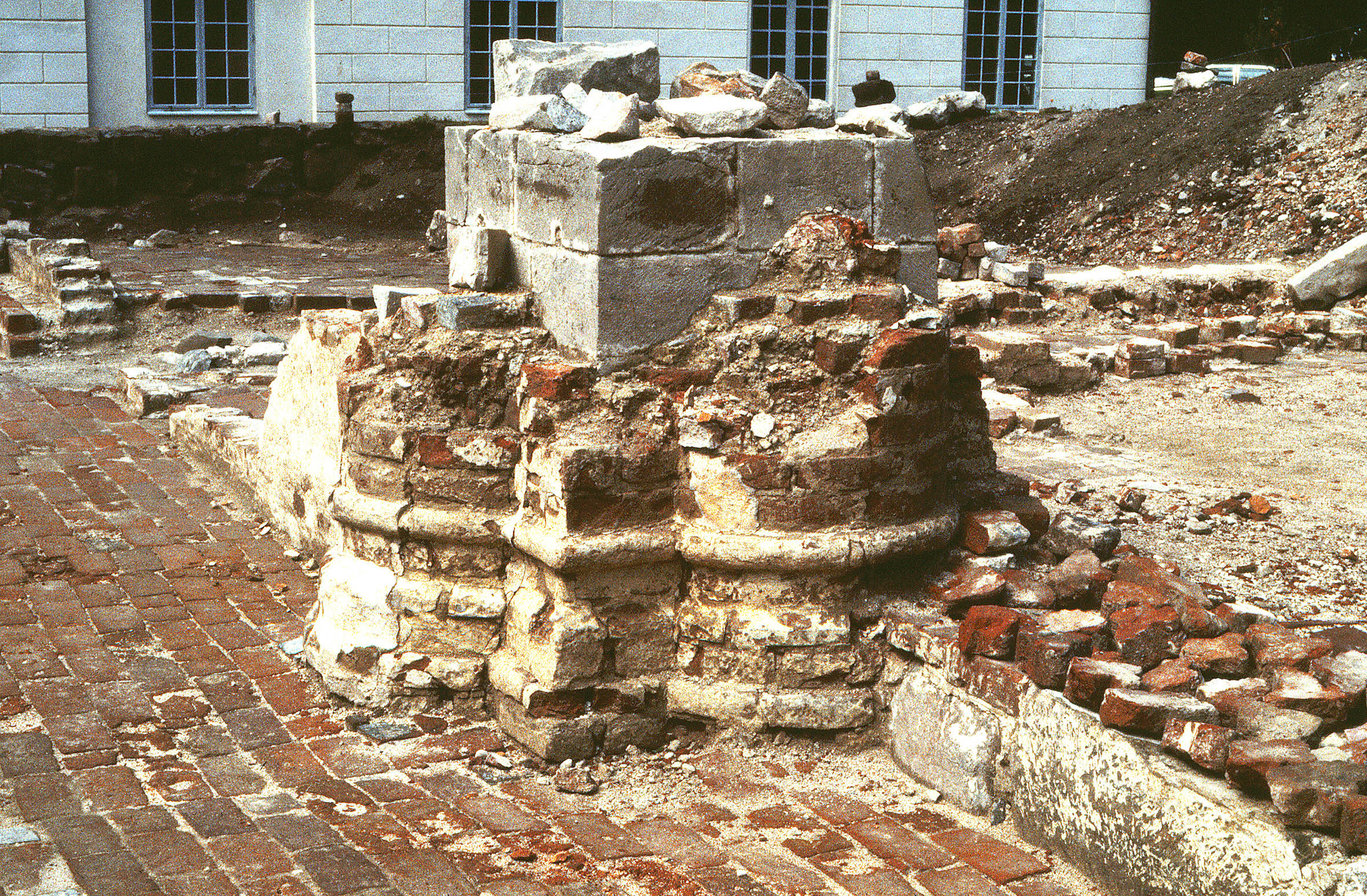 Herrevad, Sverige, pelare långhuset i öster.